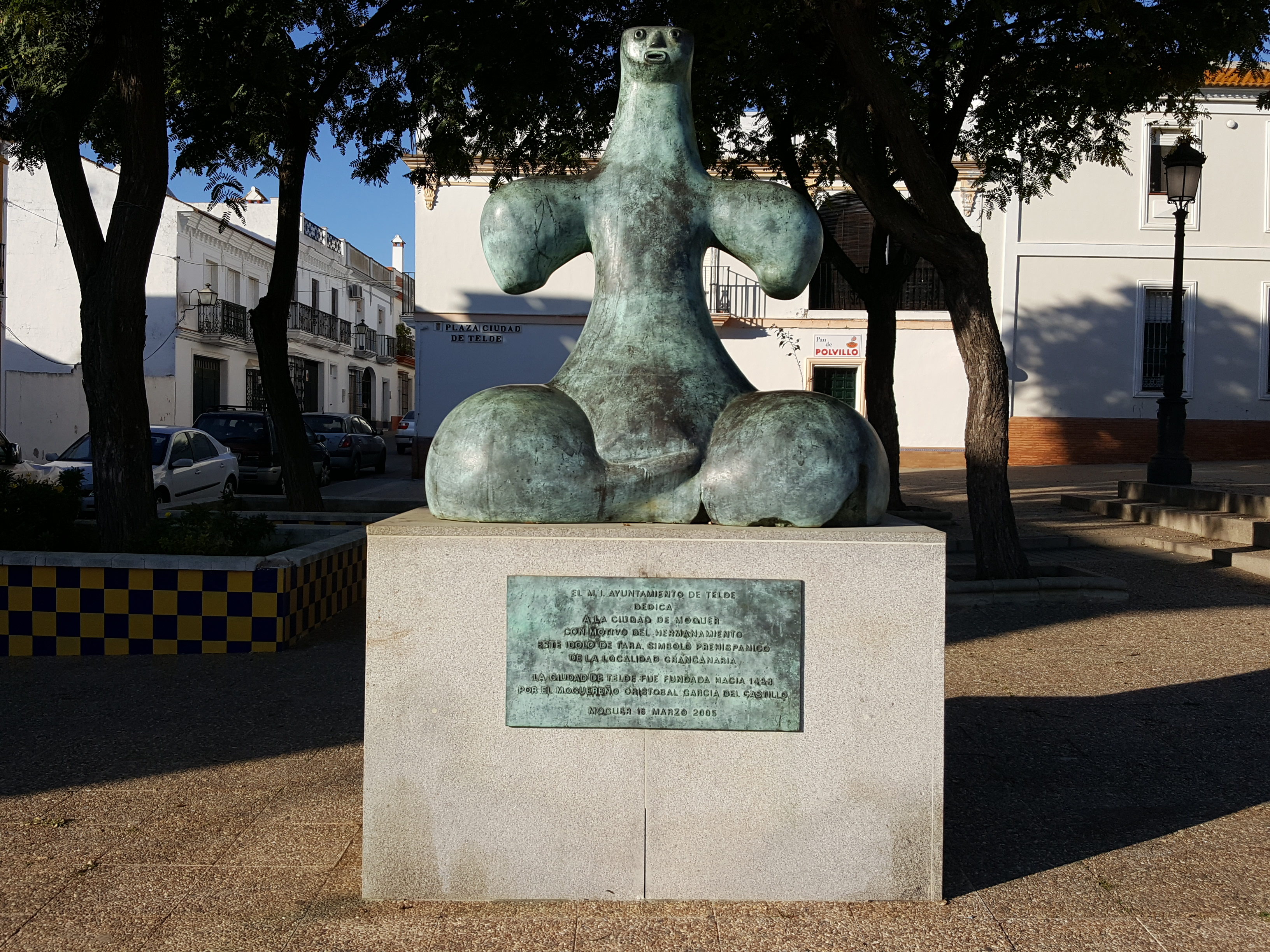 Ídolo de Tara. Regalo de Telde en 2005 por la fundación de aquel municipio de Canarias por el moguereño Cristóbal García del Castillo en 1488. Moguer, provincia de Huelva, Andalucía, España.